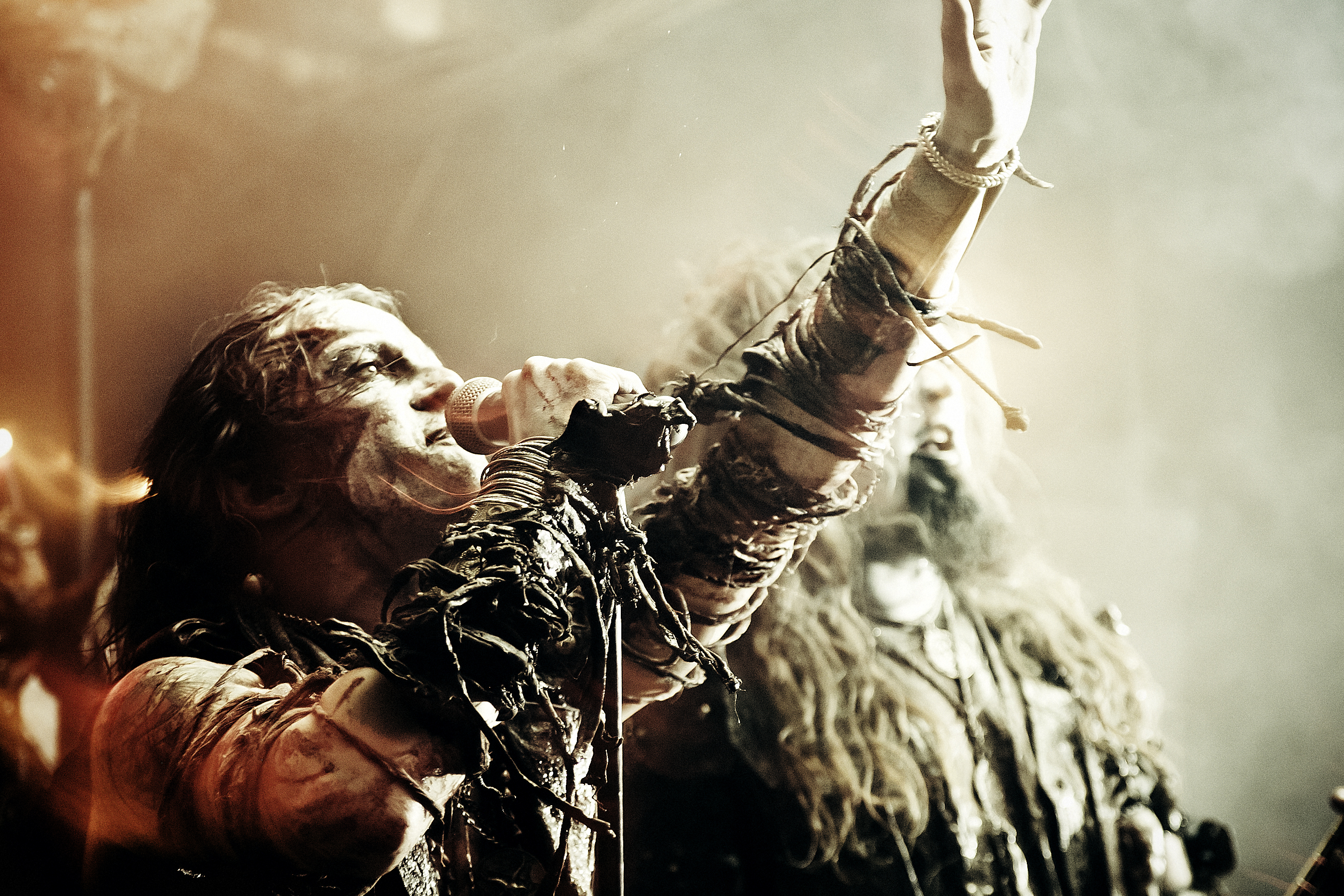 Erik Danielsson of Watain.